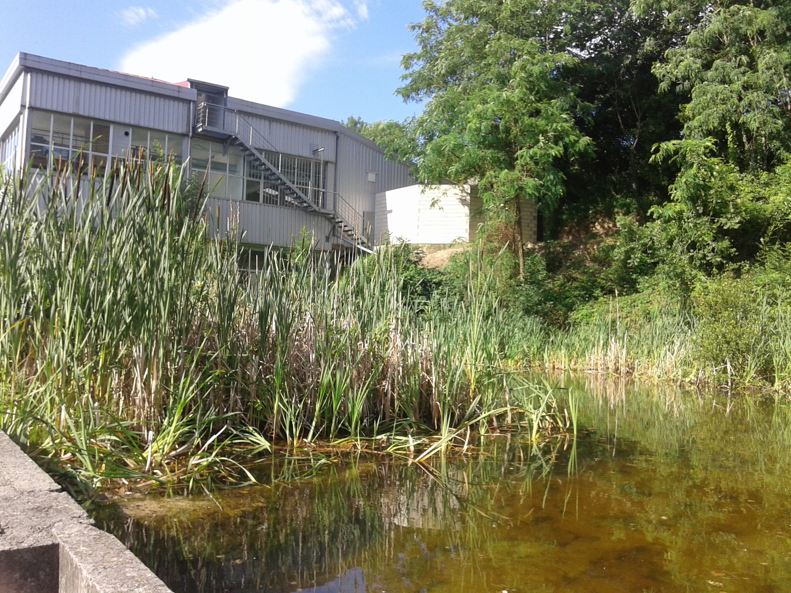 Donostiako Ibaeta auzoan urtegi zahar bat babestu da igelaren populazioa babesteko.